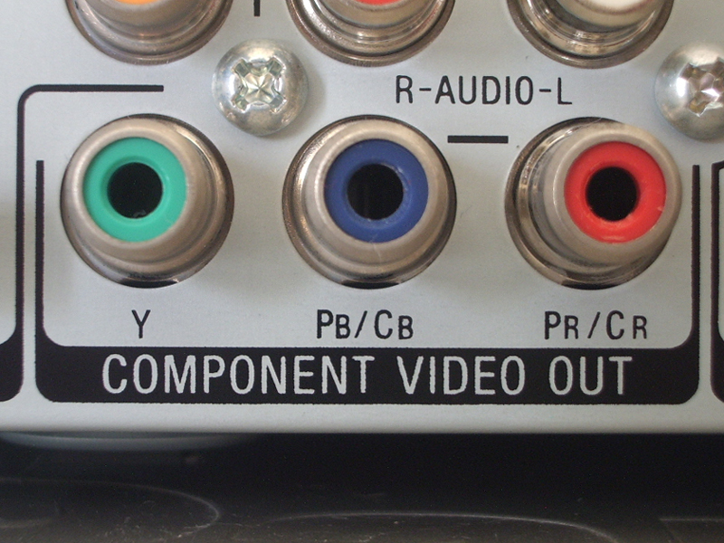 コンポーネント映像端子 機種：Sony DVDプレーヤー DVP-NS53P 撮影者・投稿者：e3uematsu 撮影日：2007/8/20